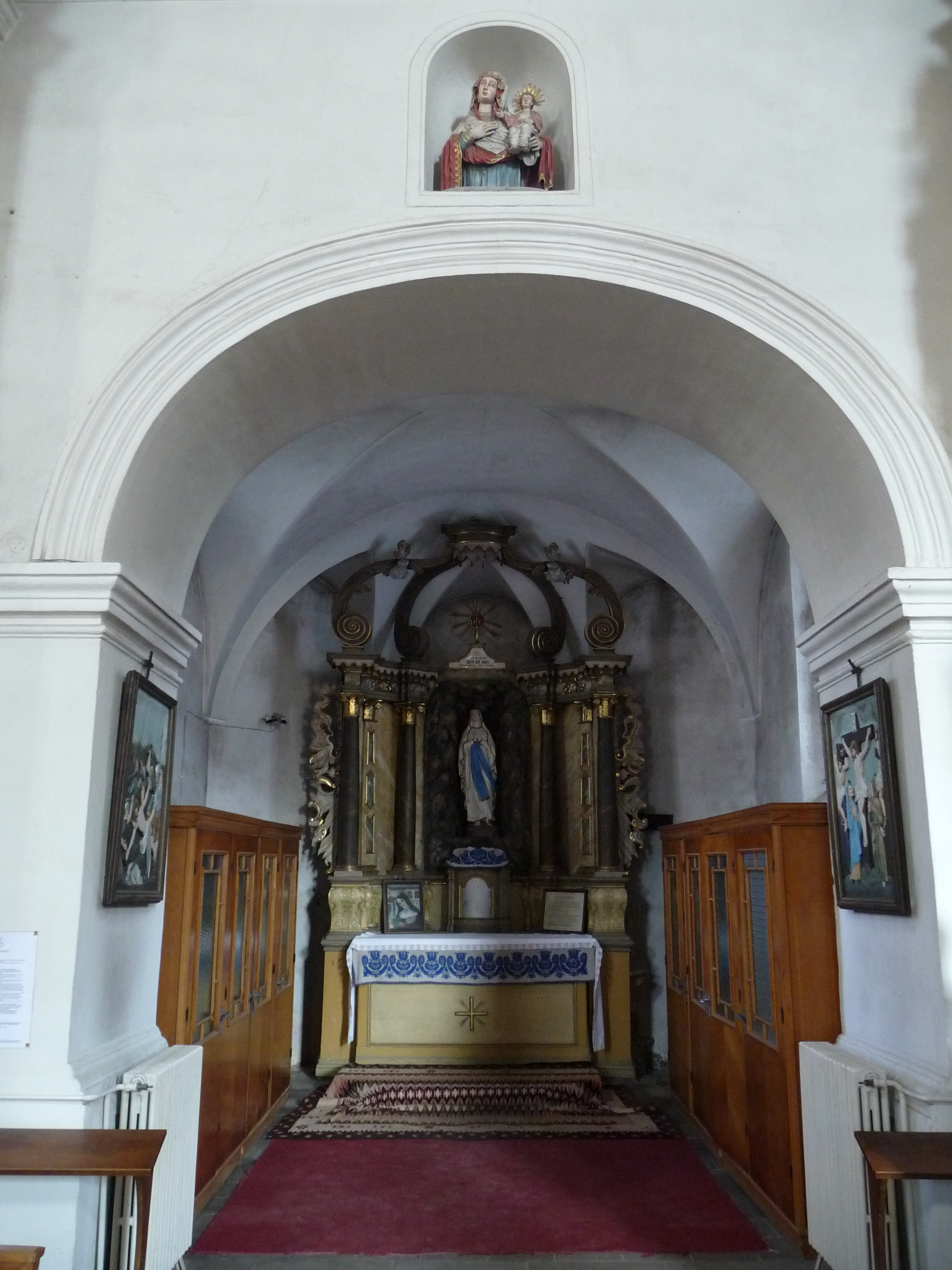 Gyergyószentmiklós, a római katolikus templom oldalkápolnája